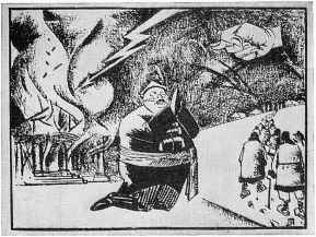 Малітва памешчыка "Божа! Ратуй ад Грамады!" Я. Горыд